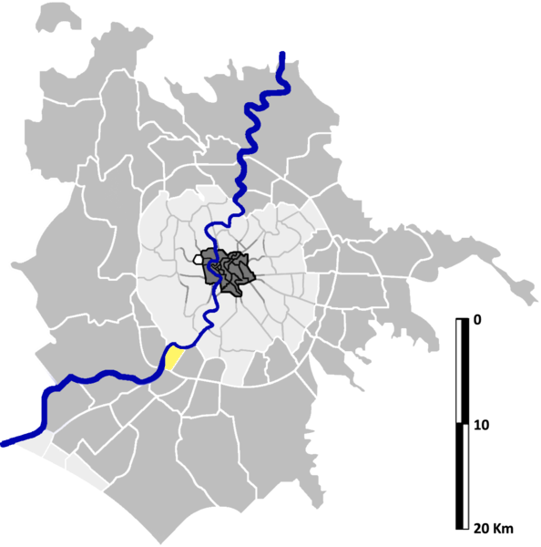 Tor di Valle